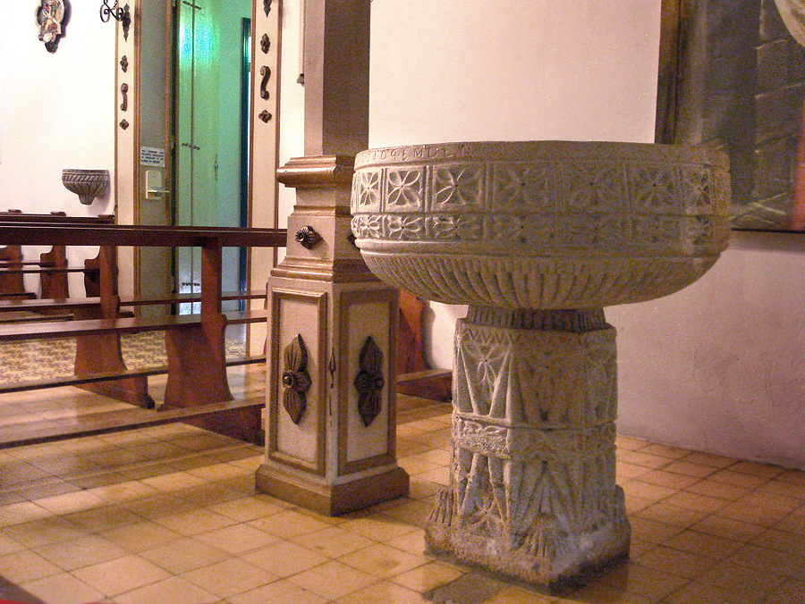 Pia batismal, Igreja Bom Jesus (1754) em Triunfo, Rio Grande do Sul, Brasil.